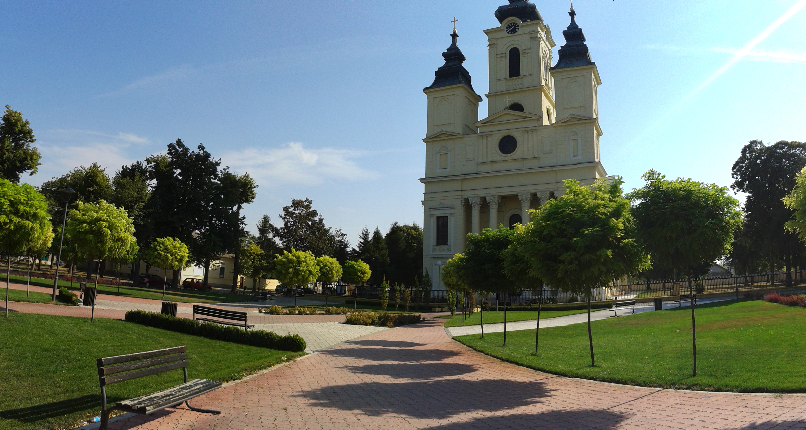 Храм Вазнесења Господњег у Чуругу